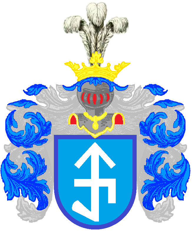 Герб Федора Богдановича Проскури